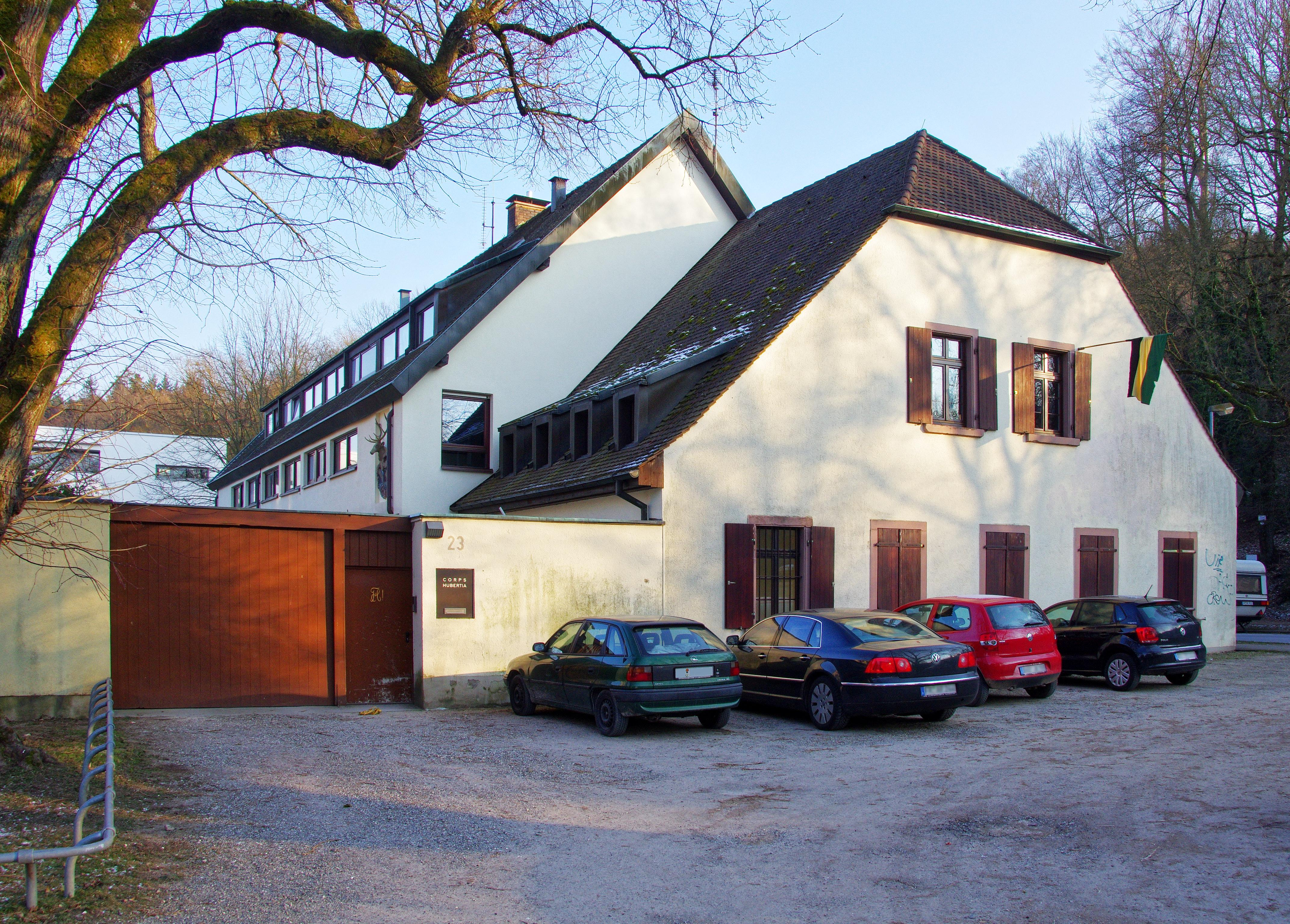 Corps Hubertia Freiburg, Fürstenbergstraße 23 79102 Freiburg im Breisgau